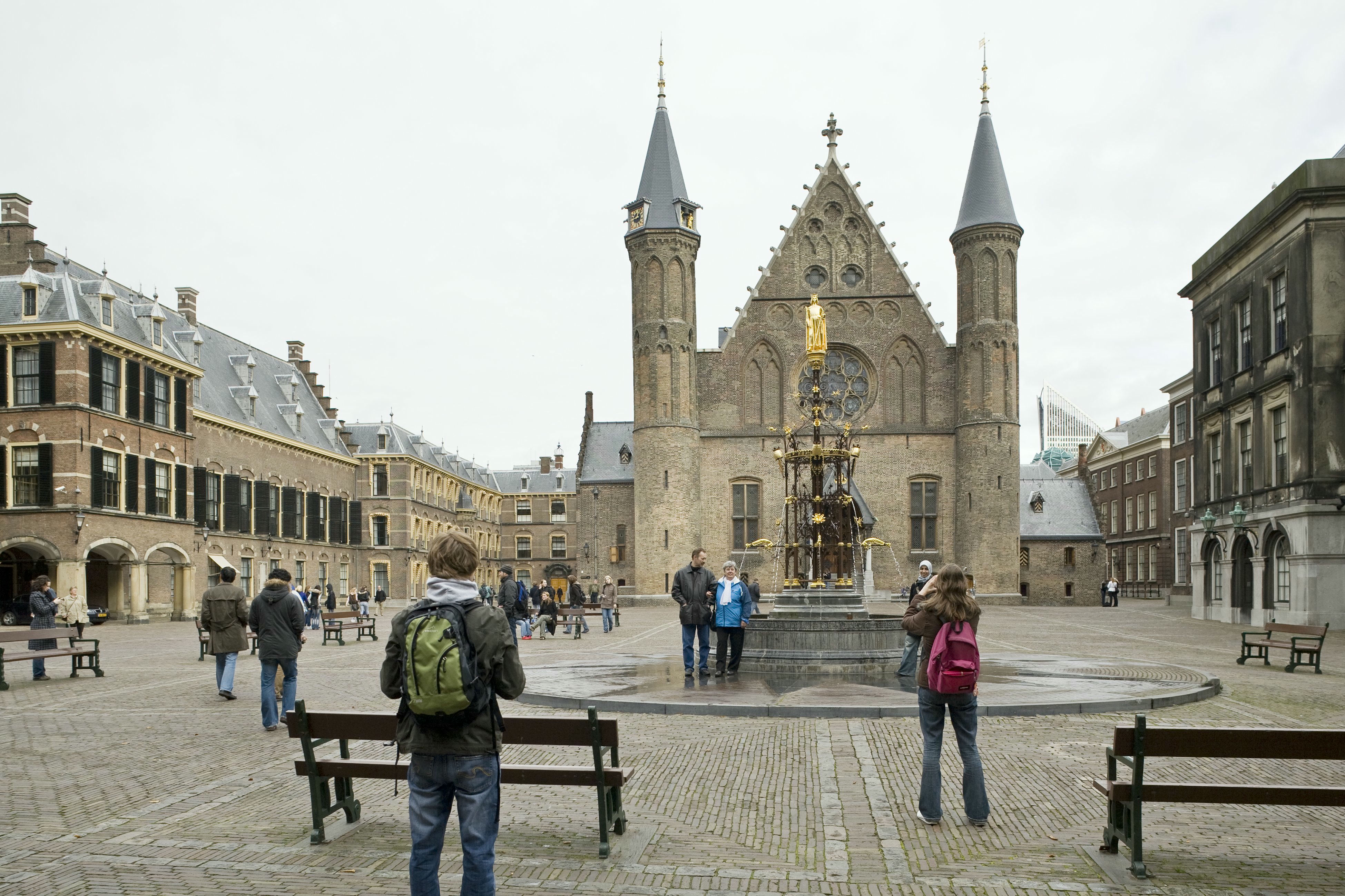 Fontein Binnenhof: Overzicht van de fontein, de Ridderzaal met het Binnenhof op de achtergond (opmerking: Opdracht t.b.v RACM Nieuwsbrief (nr: 1-januari 2008))